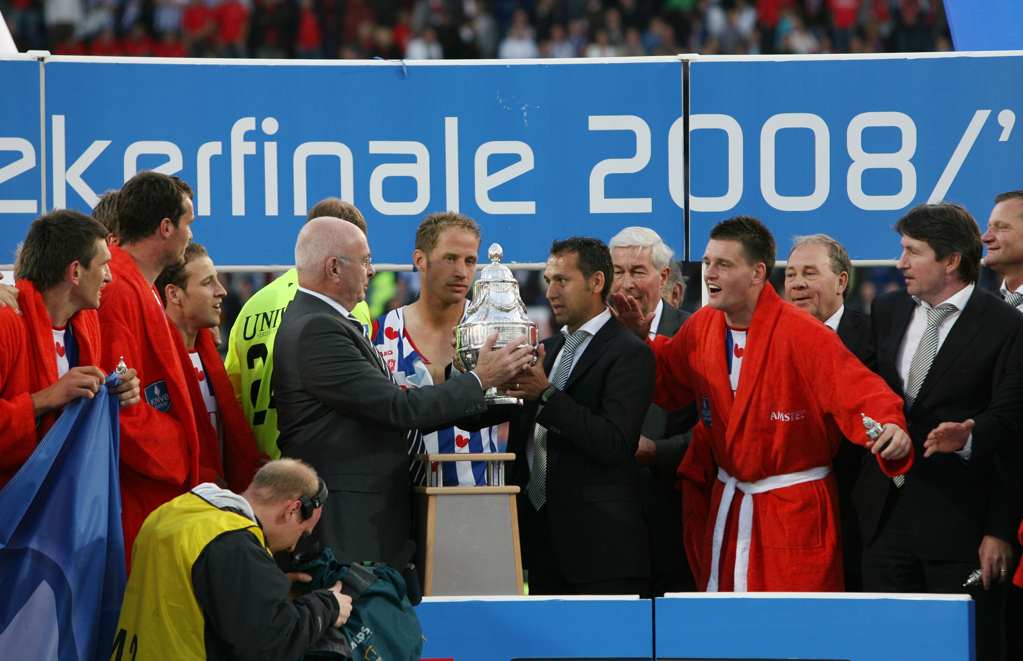 Michel Breuer neemt de beker (KNVB Beker) in ontvangst na de gewonnen wedstrijd (2-2 na strafschoppen: 5-3)tegen FC Twente op 17 mei 2009